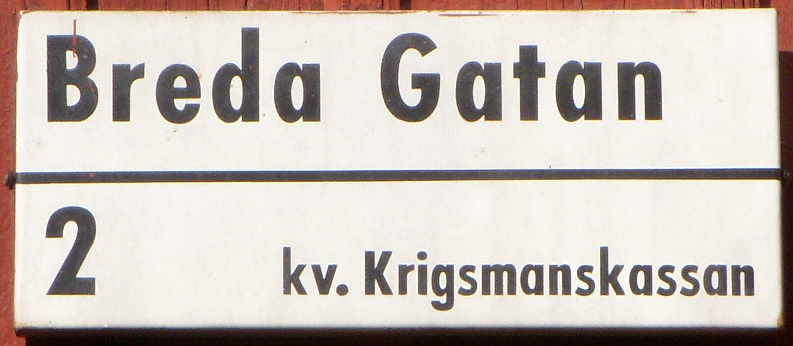 "Breda gatan" i Djurgårdsstaden i Stockholm